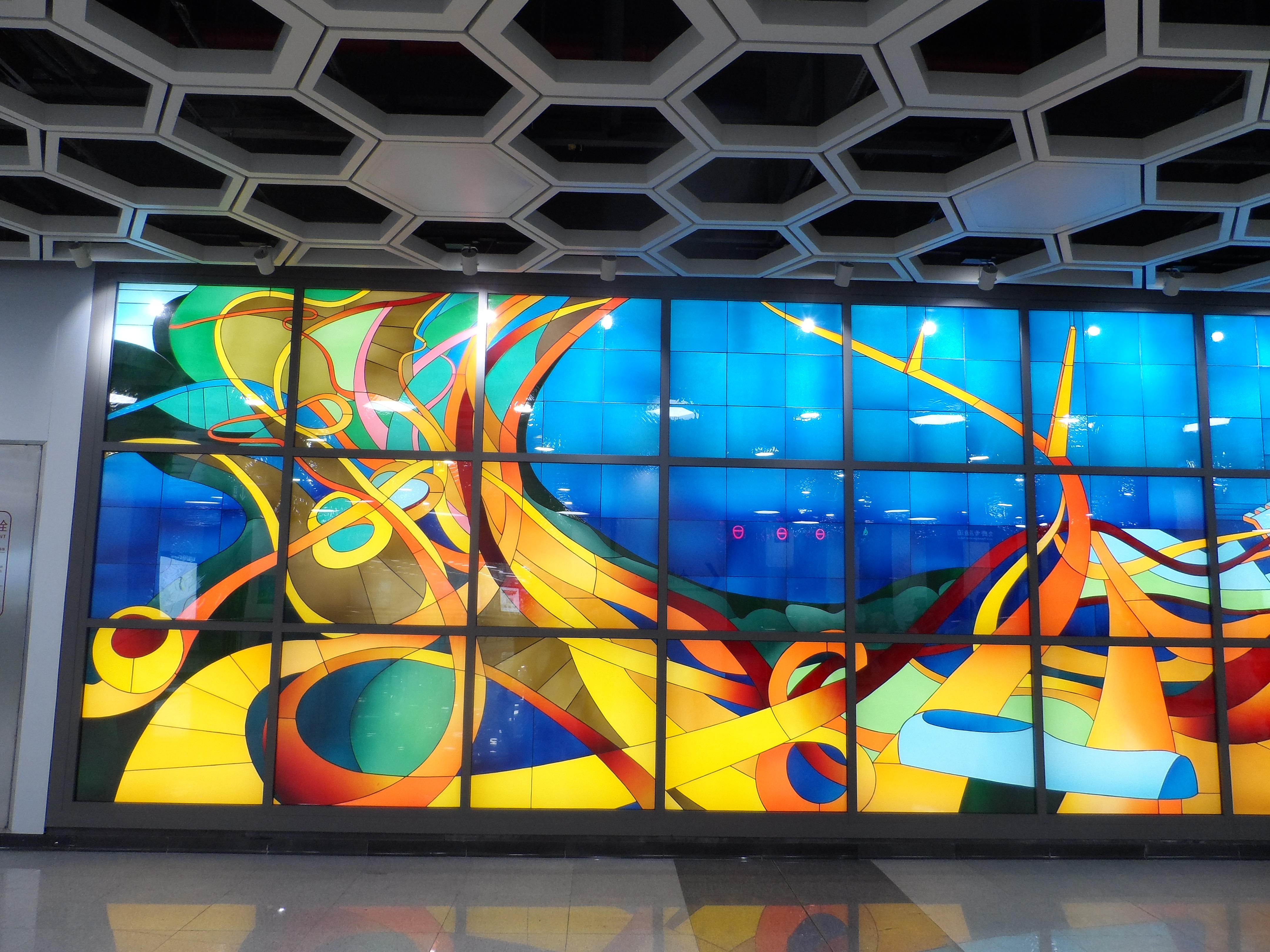 深圳地铁机场站《美丽新世界》文化墙